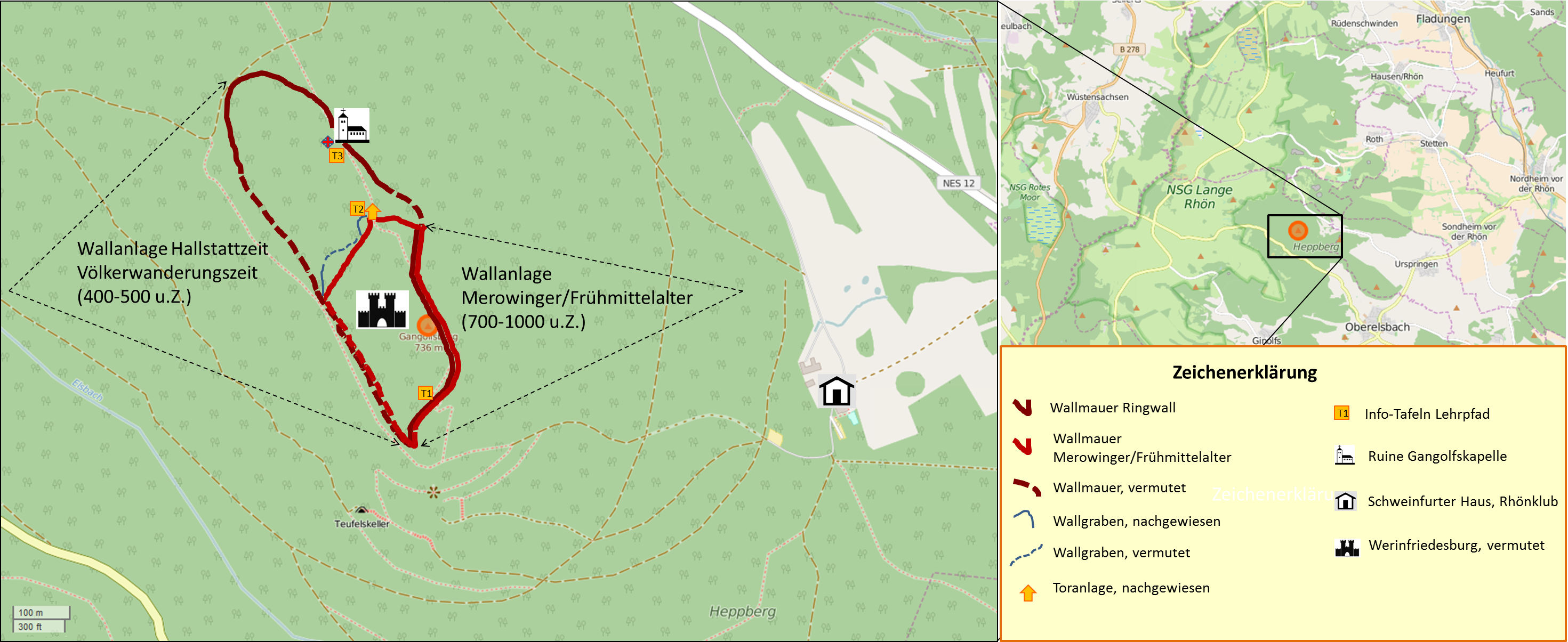 Karte der Wallanlage Gangolfsberg